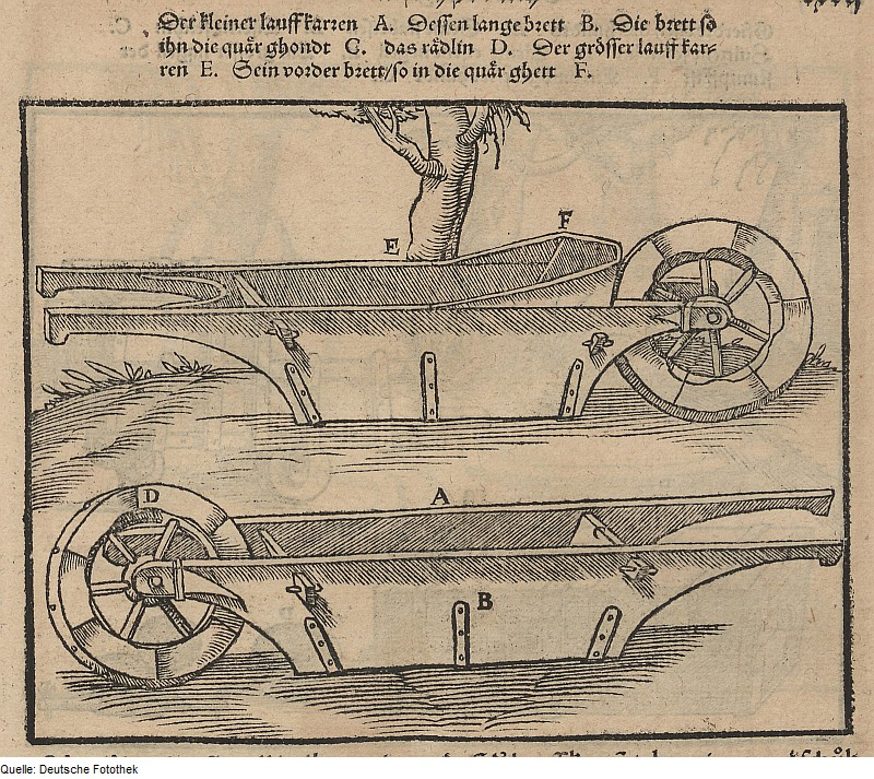 Original image description from the Deutsche FotothekBergwerk & Bergbau & Laufkarren